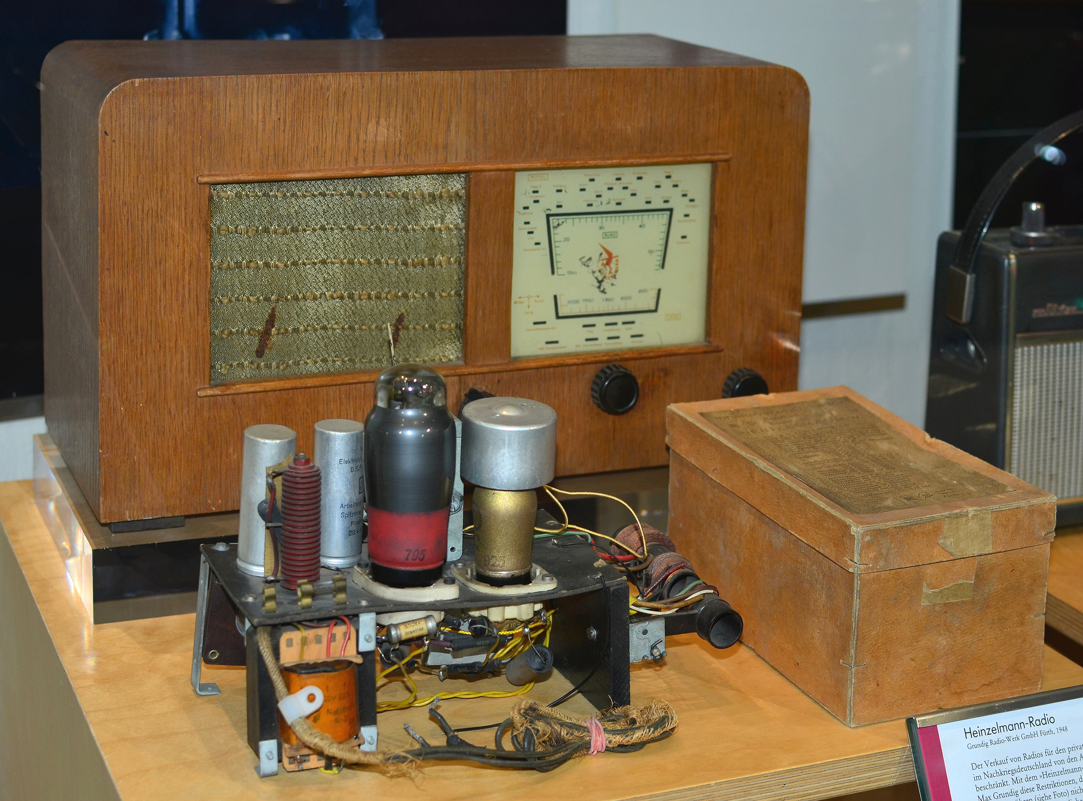 GLAM im Deutschen Museum Bonn, das Radio und der Bausatz mit Bauteilen des Heinzelmannradios sowie der Verpackungskarton